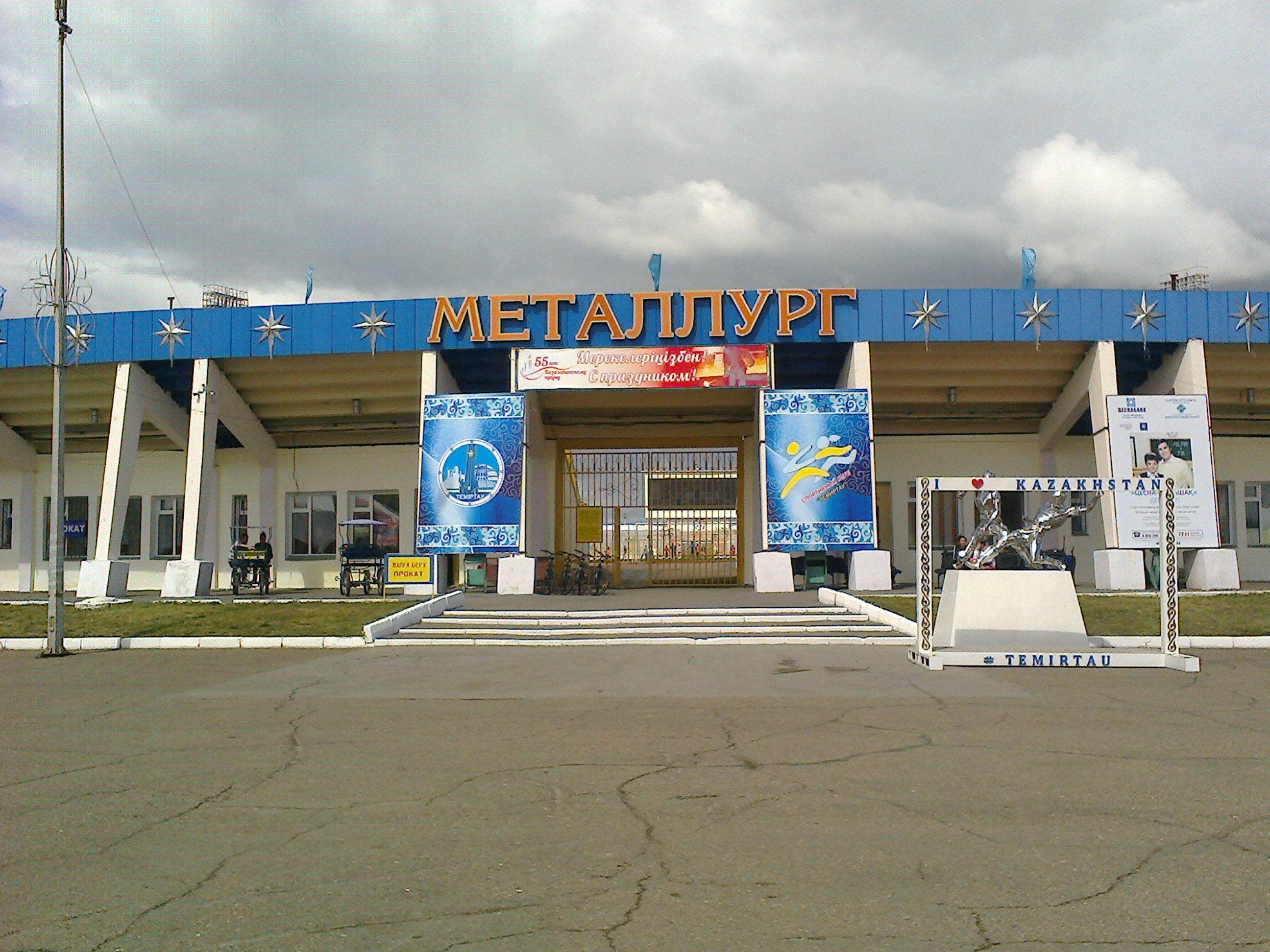 Стадион Металлург